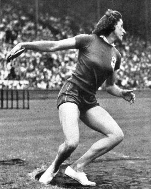 Micheline Ostermeyer championne olympique au lancer du disque à Londres en 1948.